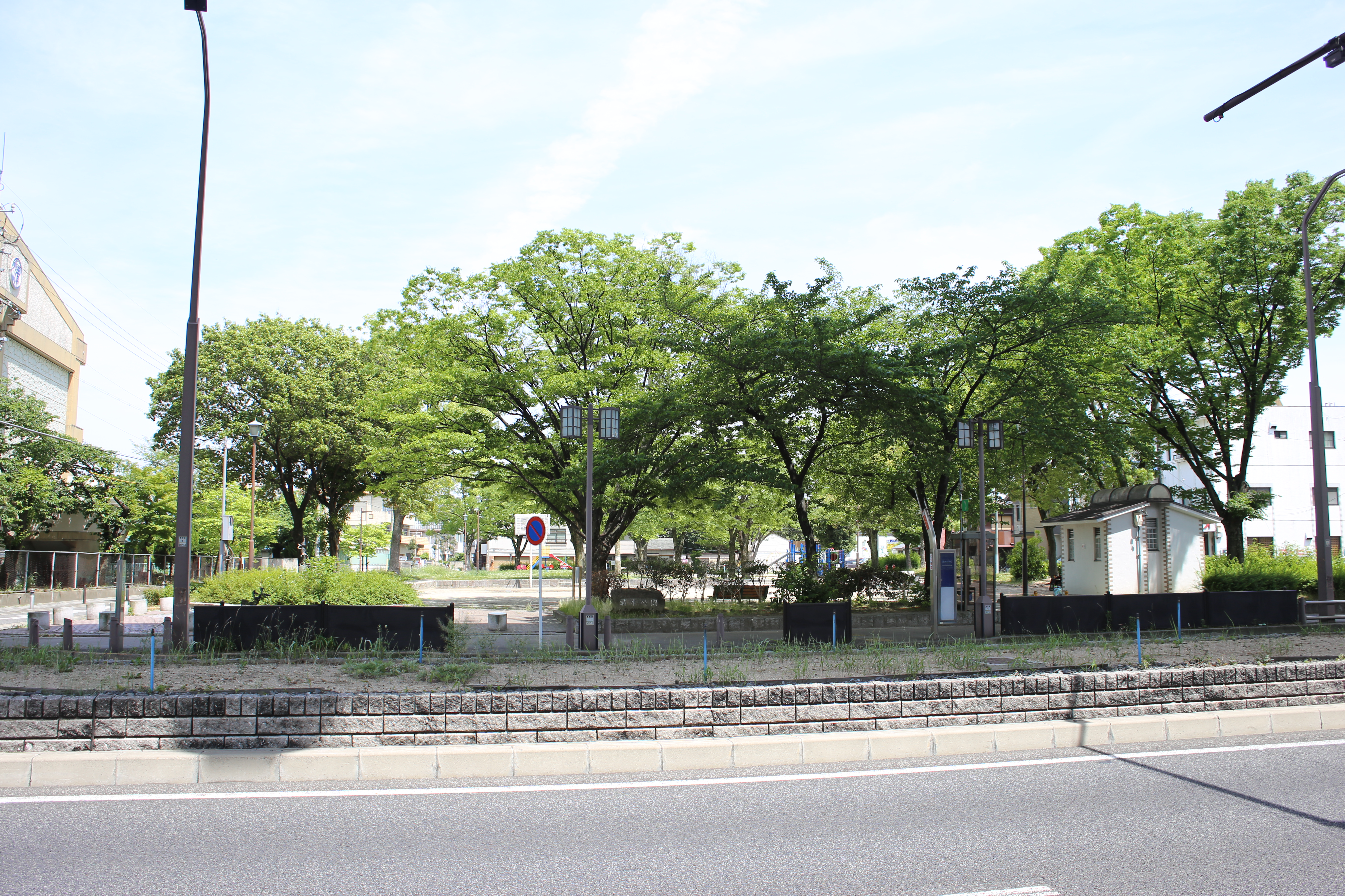 名古屋市北区清水五丁目の清水公園を西側公道より撮影